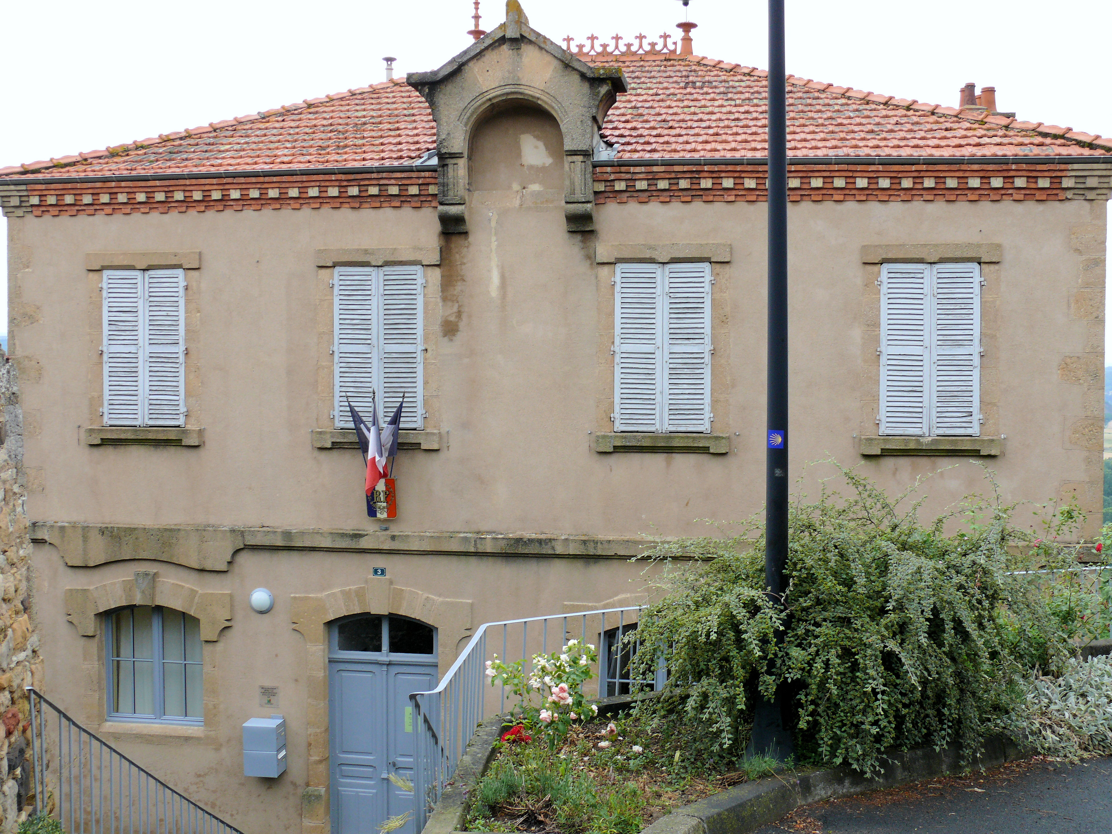 Nonette - Mairie